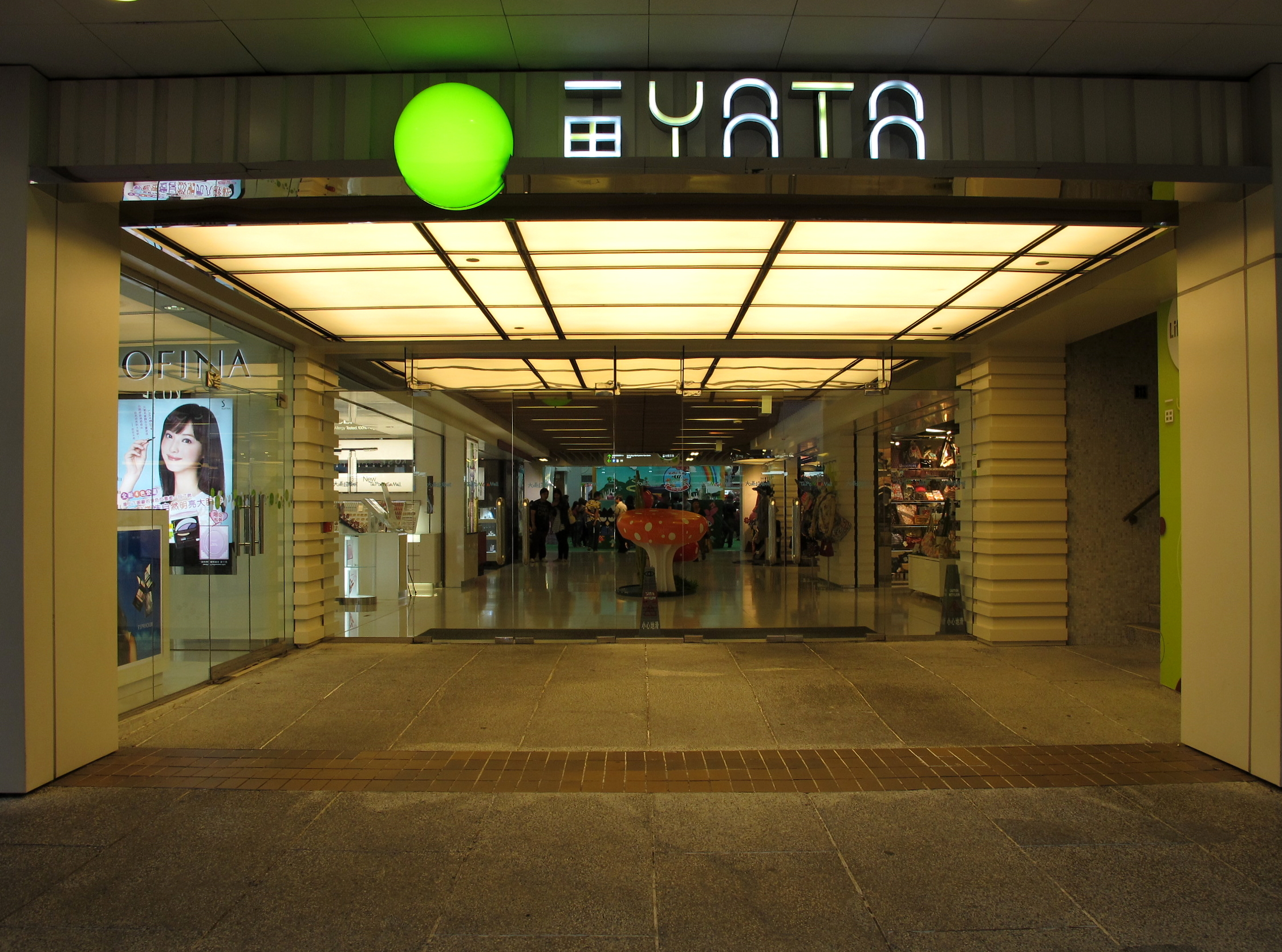 Tai Po Mega Mall YATA Enterance 一田百貨大埔超級城分店